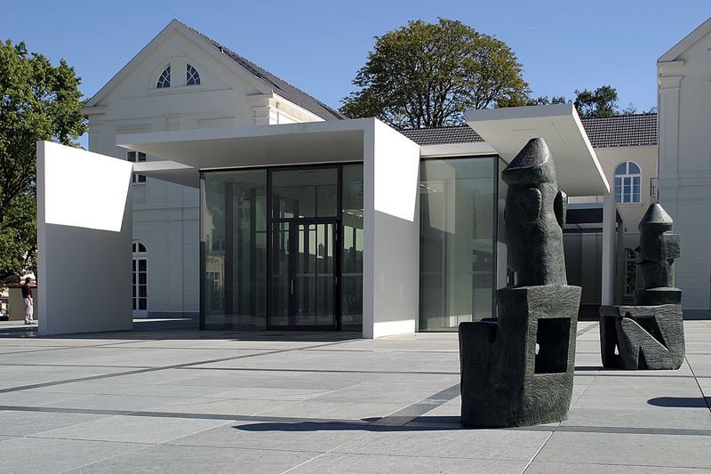 Max-Ernst-Museum Brühl Beschreibung: Neubau des Max-Ernst-Museums in der Stadt Brühl (Rheinland) mit Skulpturen des Künstlers, ArchitektenThomas van den Valentyn und Seyed Mohammad Oreyzi Quelle: Eigene Aufnahme, September 2004 Fotograf: Thomas Robbin (für die GNU FDL) 22:08, 29. Nov 2004 Thomas Robbin 800 x 533 (199969 Byte) (Max-Ernst-Museum Brühl)